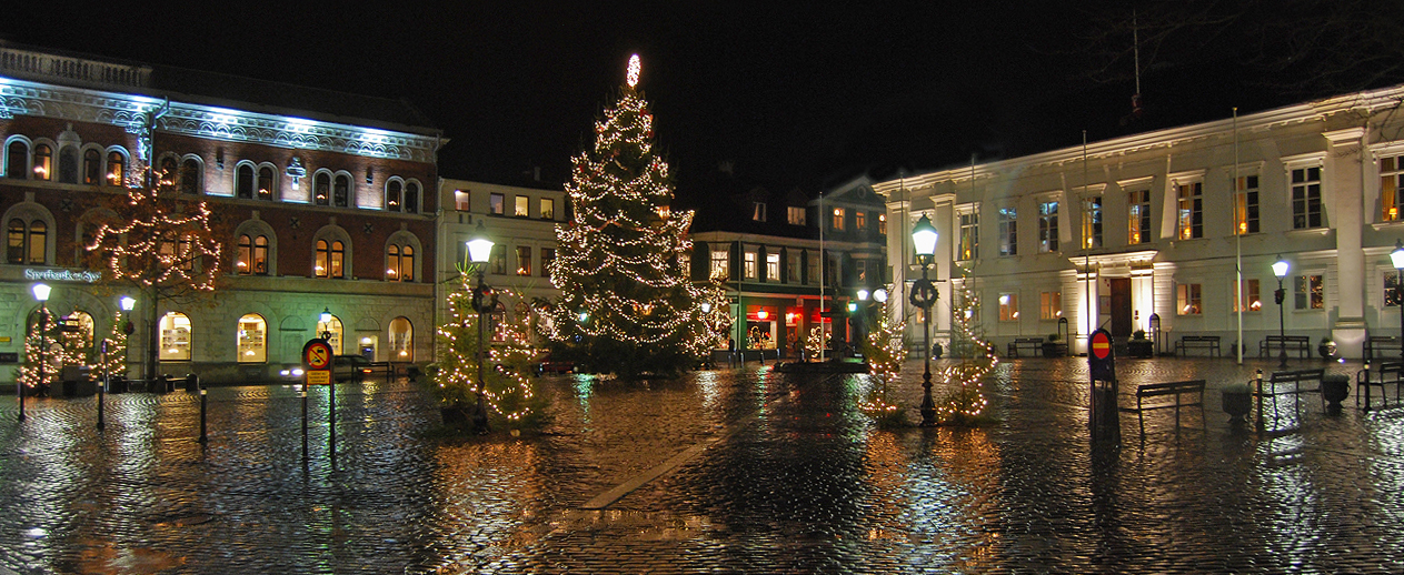 Stortorget Ystad 29 nov 2013.